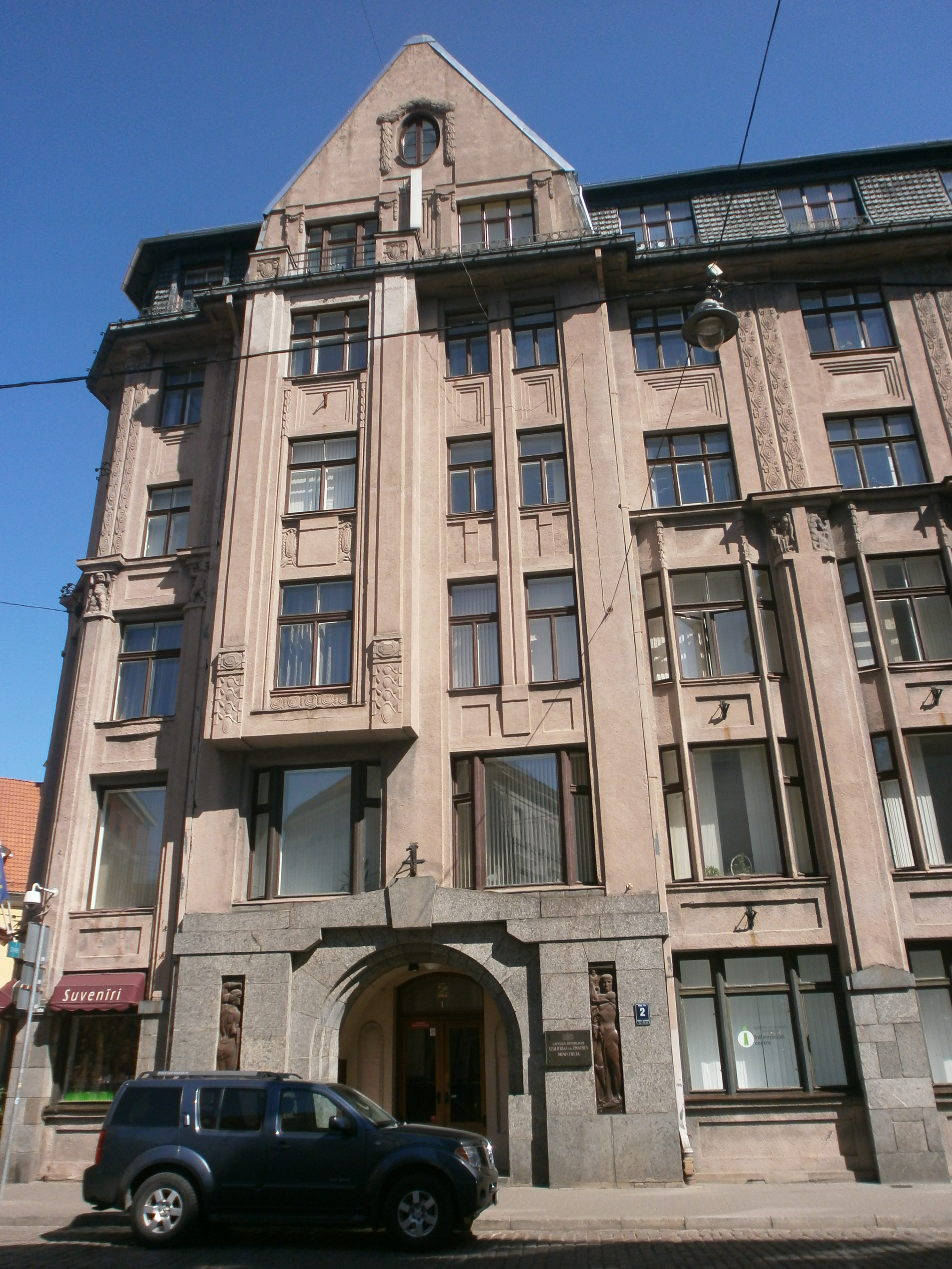 Latvijas Republikas Izglītības un zinātnes ministrija